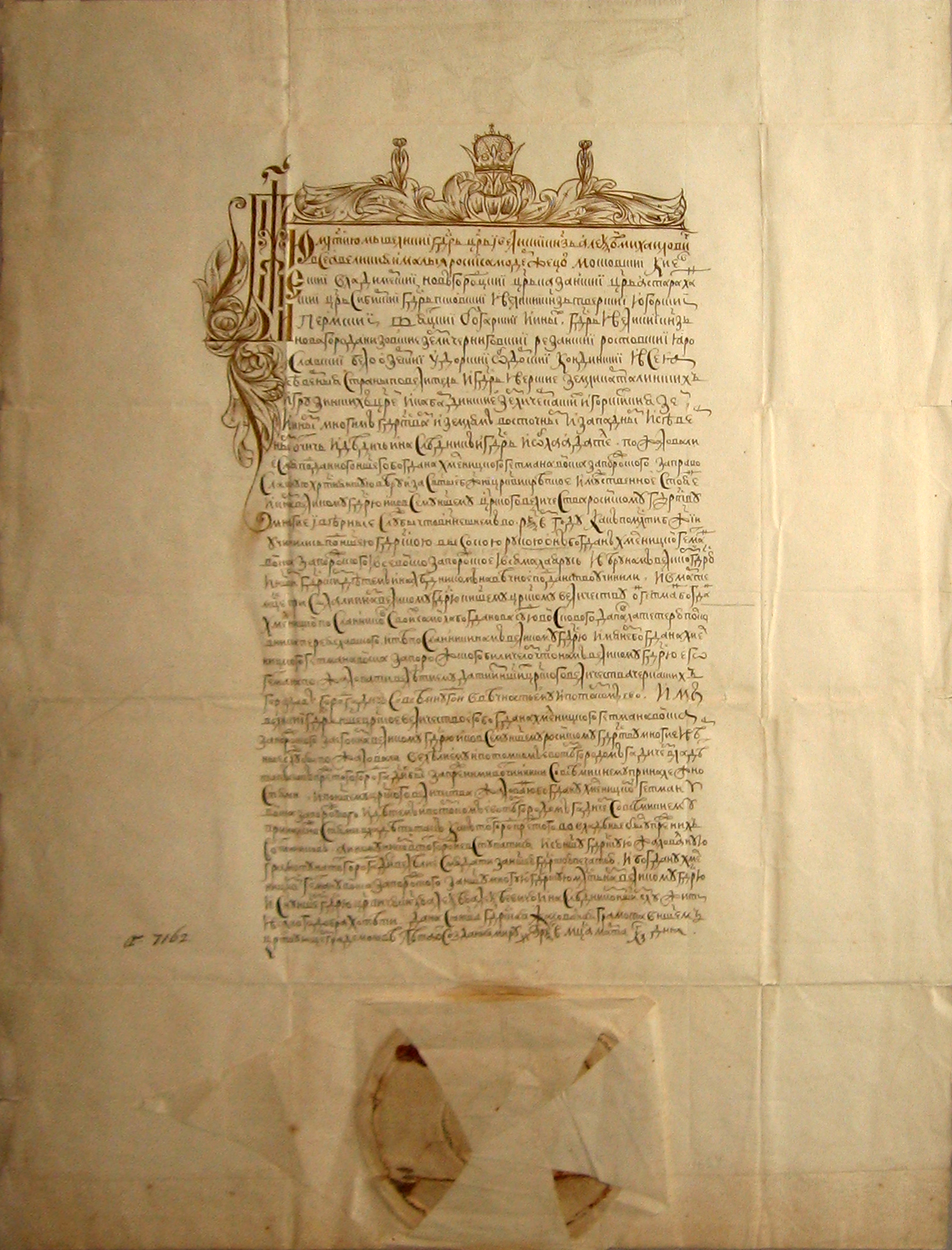 Грамота Алексея Mихайловича Хмельницкому на владение Гадячем 1654